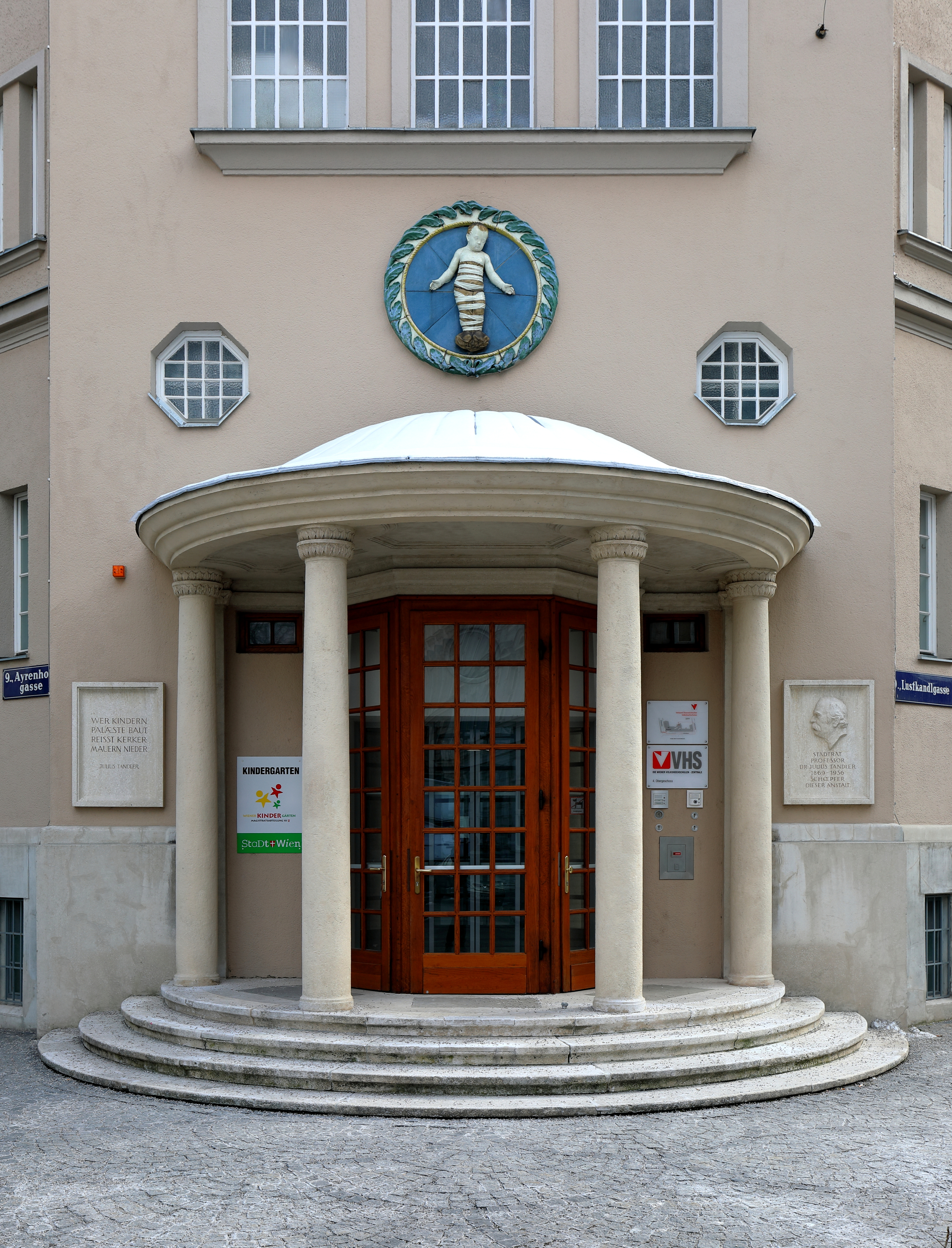 Das Hauptportal des Julius-Tandler-Familienzentrums an der Ecke Lustkandlgasse/Ayrenhoffgasse im 9. Wiener Gemeindebezirk Alsergrund. Der L-förmige Eckbau in Heimatstilformen wurde ab 1923 auf Initiative von Stadtrat Julius Tandler nach Plänen von Adolf Stöckl errichtet und am 18. Juni 1925 als Kinderübernahmestelle der Stadt Wien eröffnet. Ab 1964 erfolgte ein Umbau sowie eine Renovierung des Gebäudes und am 22. November 1965 die Eröffnung als Julius-Tandler-Heim.